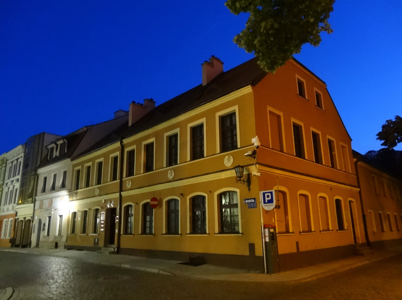 Ulica Jezuicka w Bydgoszczy